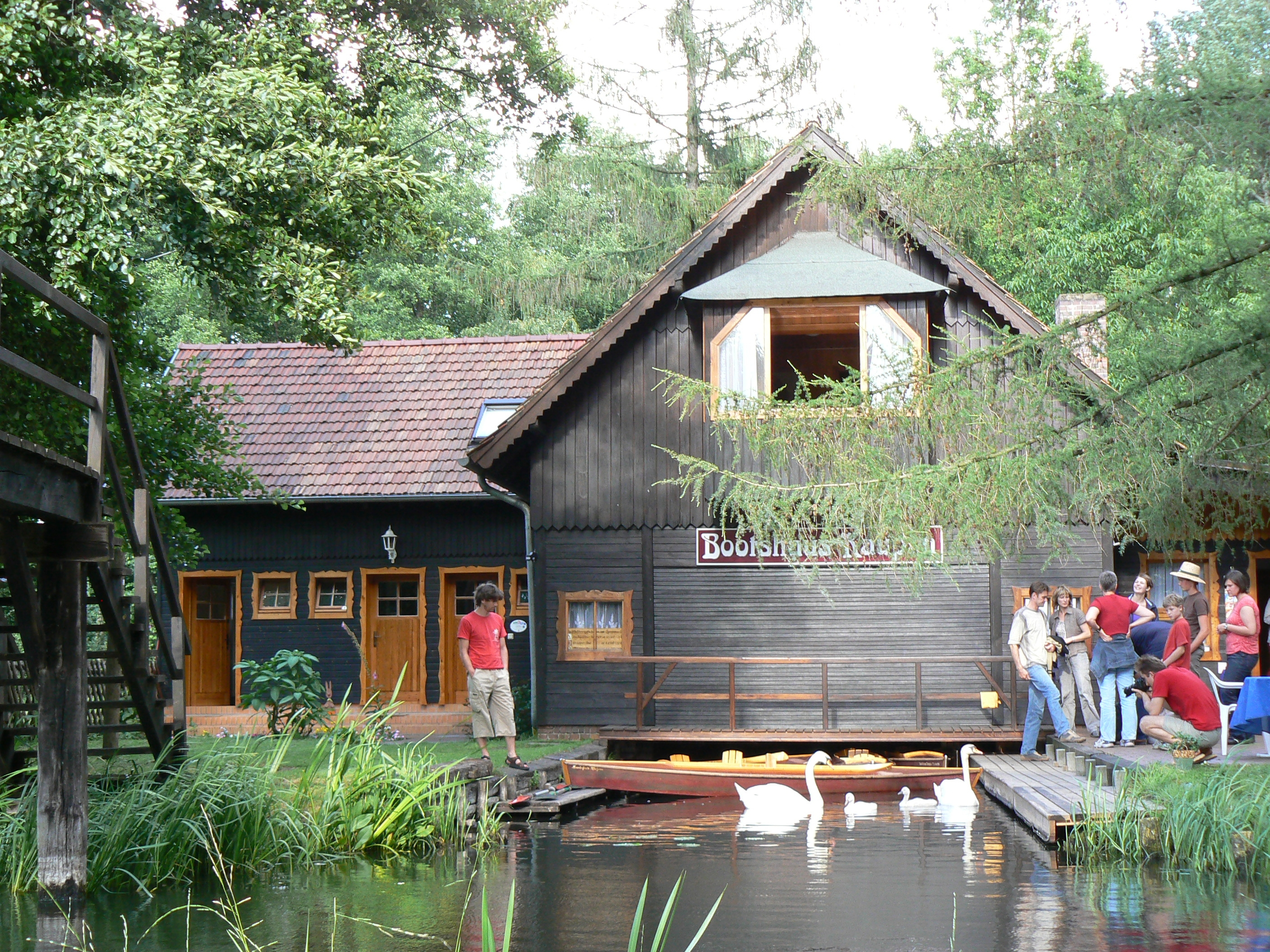 Der Paddelbootsverleih Bootshaus Kaupen am Rande von Lübbenau befindet sich auf einer Kaupe. Ein idealer Start zur Erkundung des Spreewaldes.